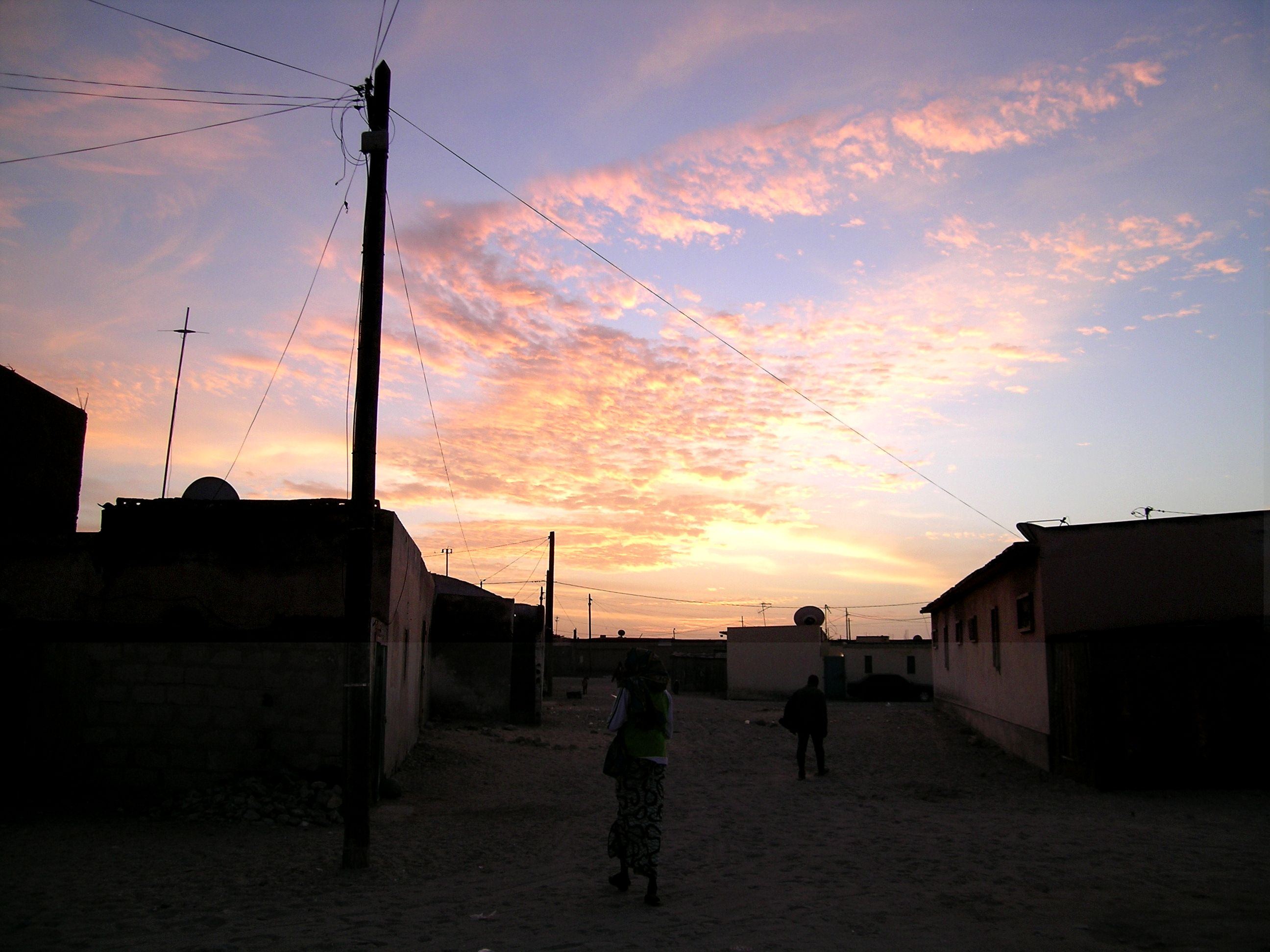 rue au lever du soleil Nouadhibou